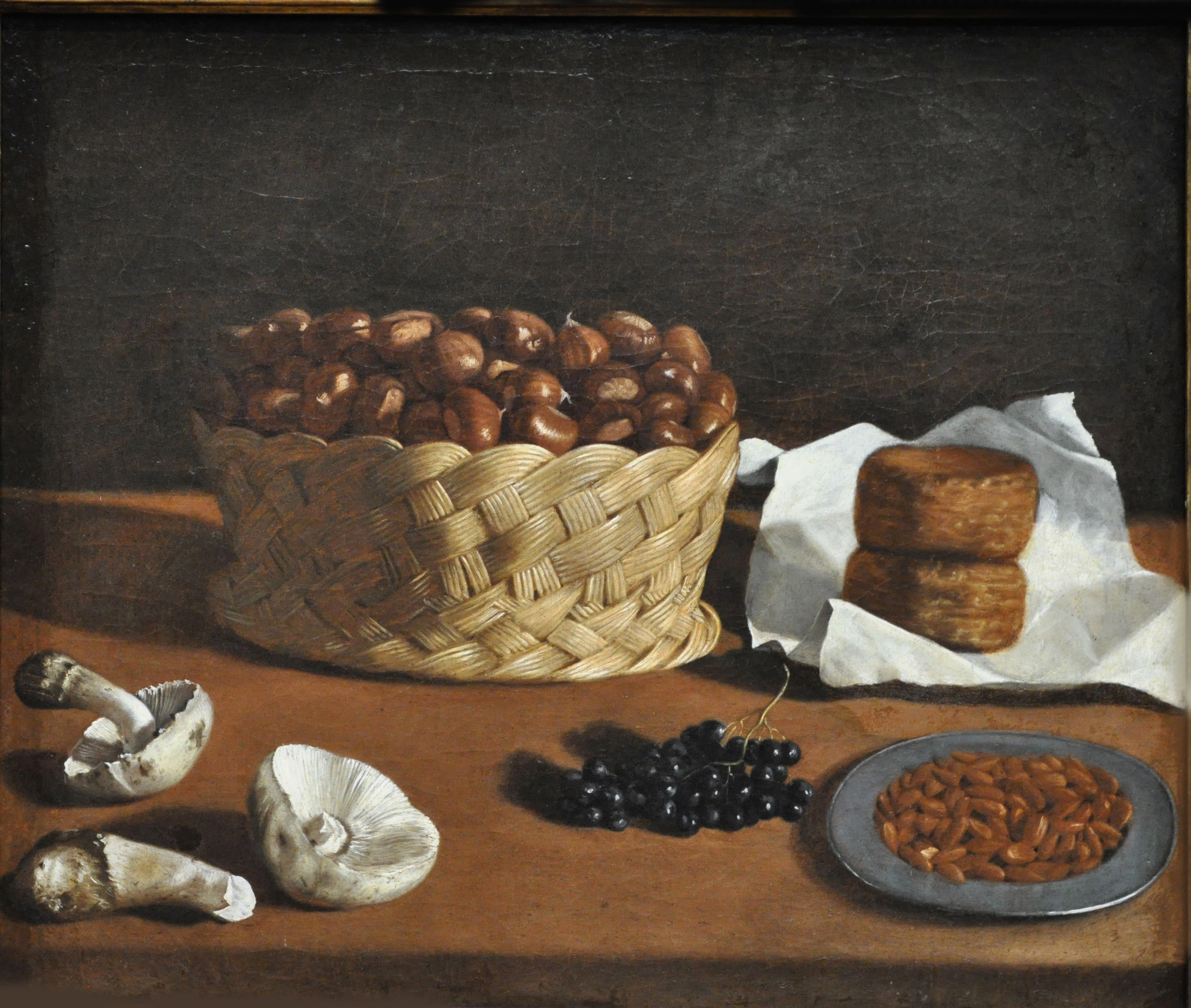 Kitchen Still Life